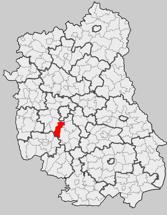 Map of gmina Strzyżewice, Lublin county, Lublin voivodship Mapa gminy Strzyżewice, powiat lubelski, województwo lubelskie